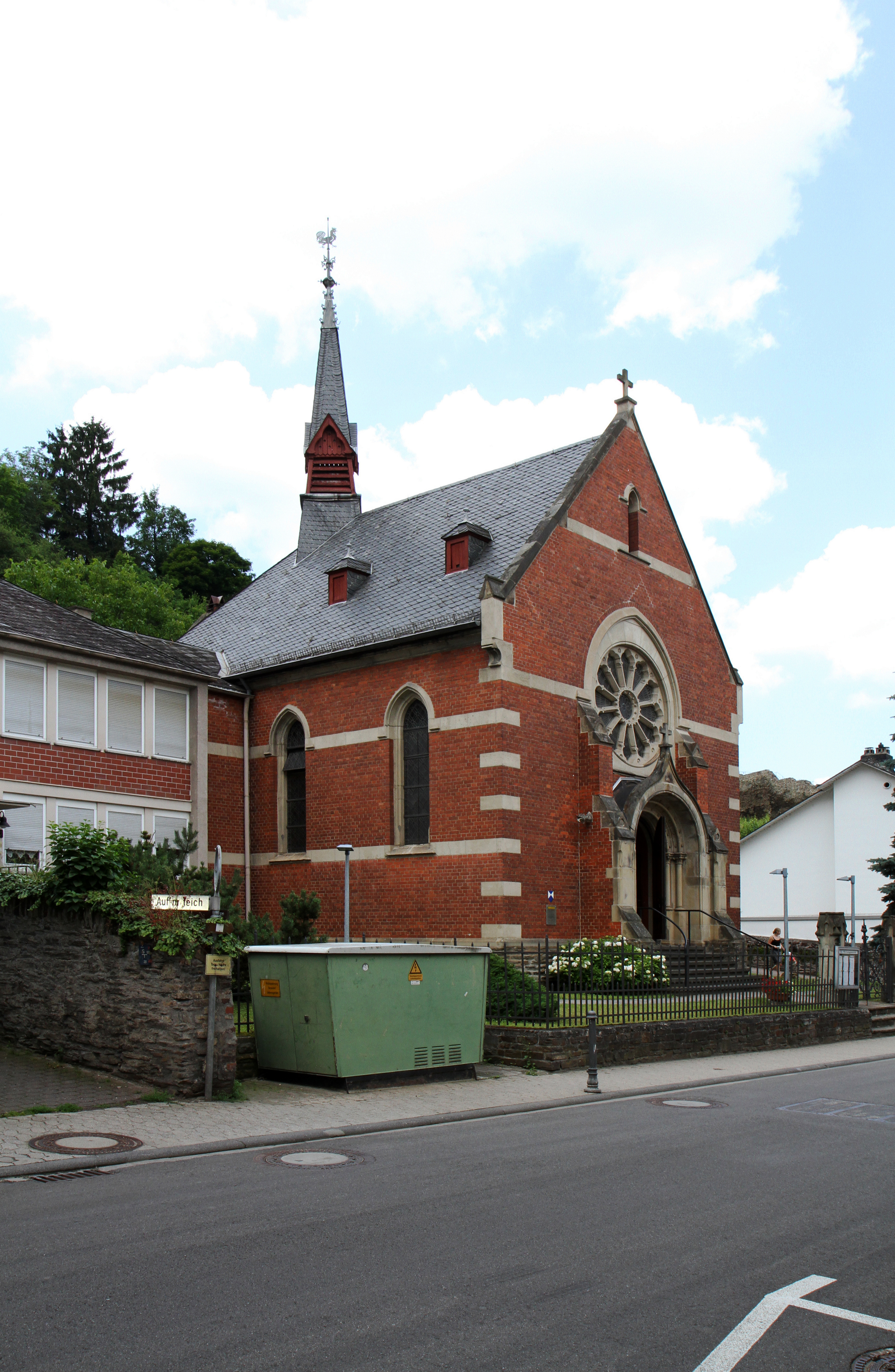 Evangelische Kirche Oberwesel, Chablis-Straße. Die Kirche ist ein neugotischer Backsteinbau, der nach Plänen des Architekten August Heinz aus Boppard zwischen 1897 und 1899 erbaut wurde.